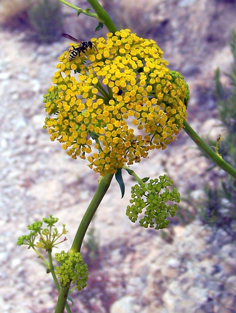 Bupleurum gibraltarium (Crujía, Cuchilleja) - Umbela en flor y otras en preantesis - Senda del Puch, circa Paso de las Yegüas, Monte del San Cayetano, Albatera (Alicante, España).